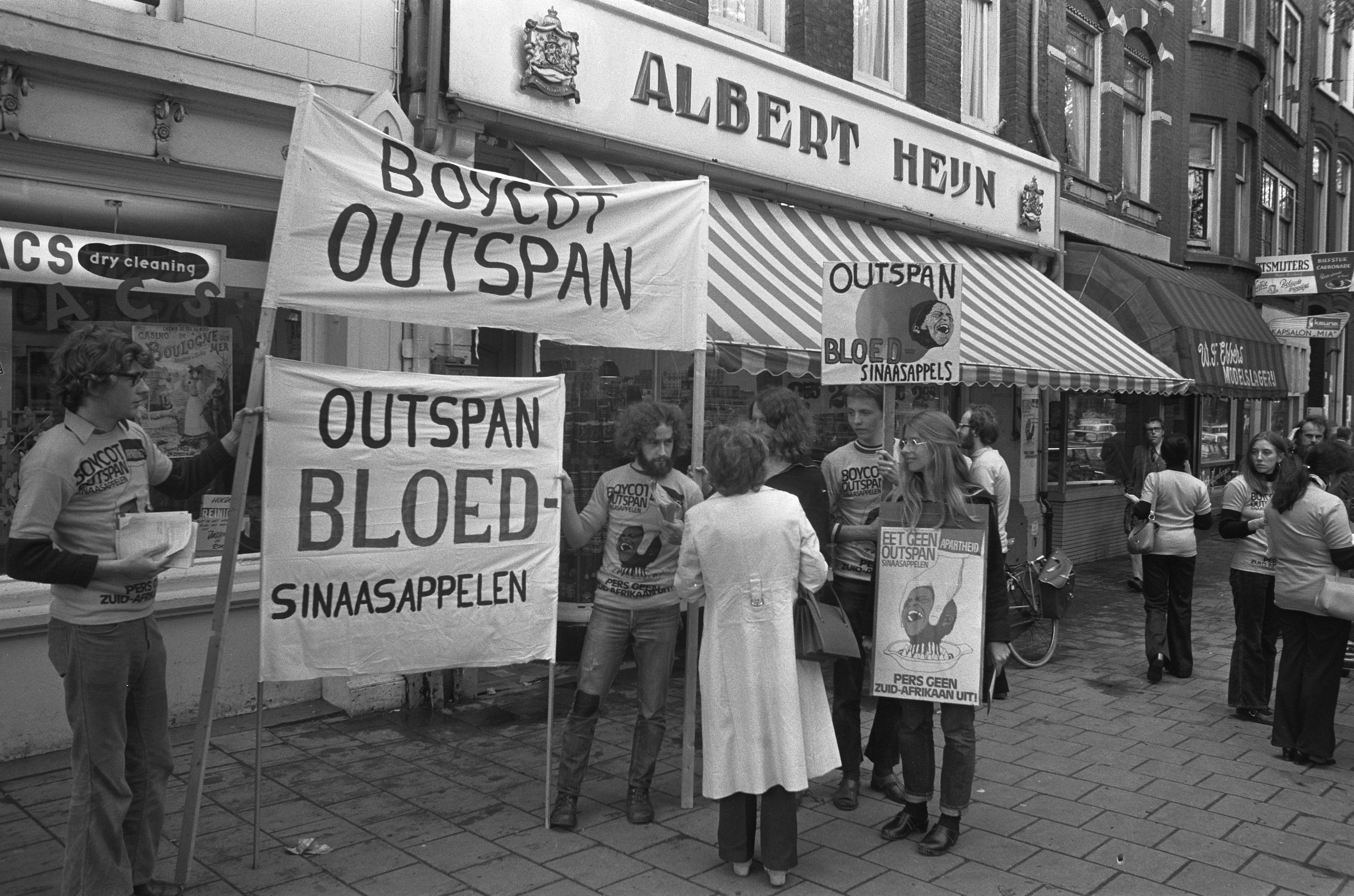 Boycot Outspan actie , protest tegen verkoop van Zuid-Afrikaanse sinaasappelen bij supermarkt Albert Heijn.Datum 23 mei 1973